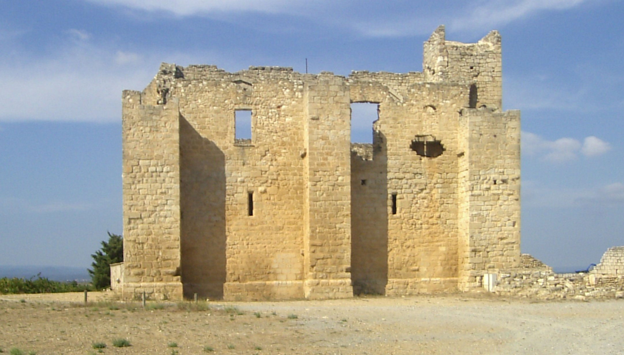 Grange cistercienne de Fontcalvy (ruines de l'ancienne) d'Ouveillan